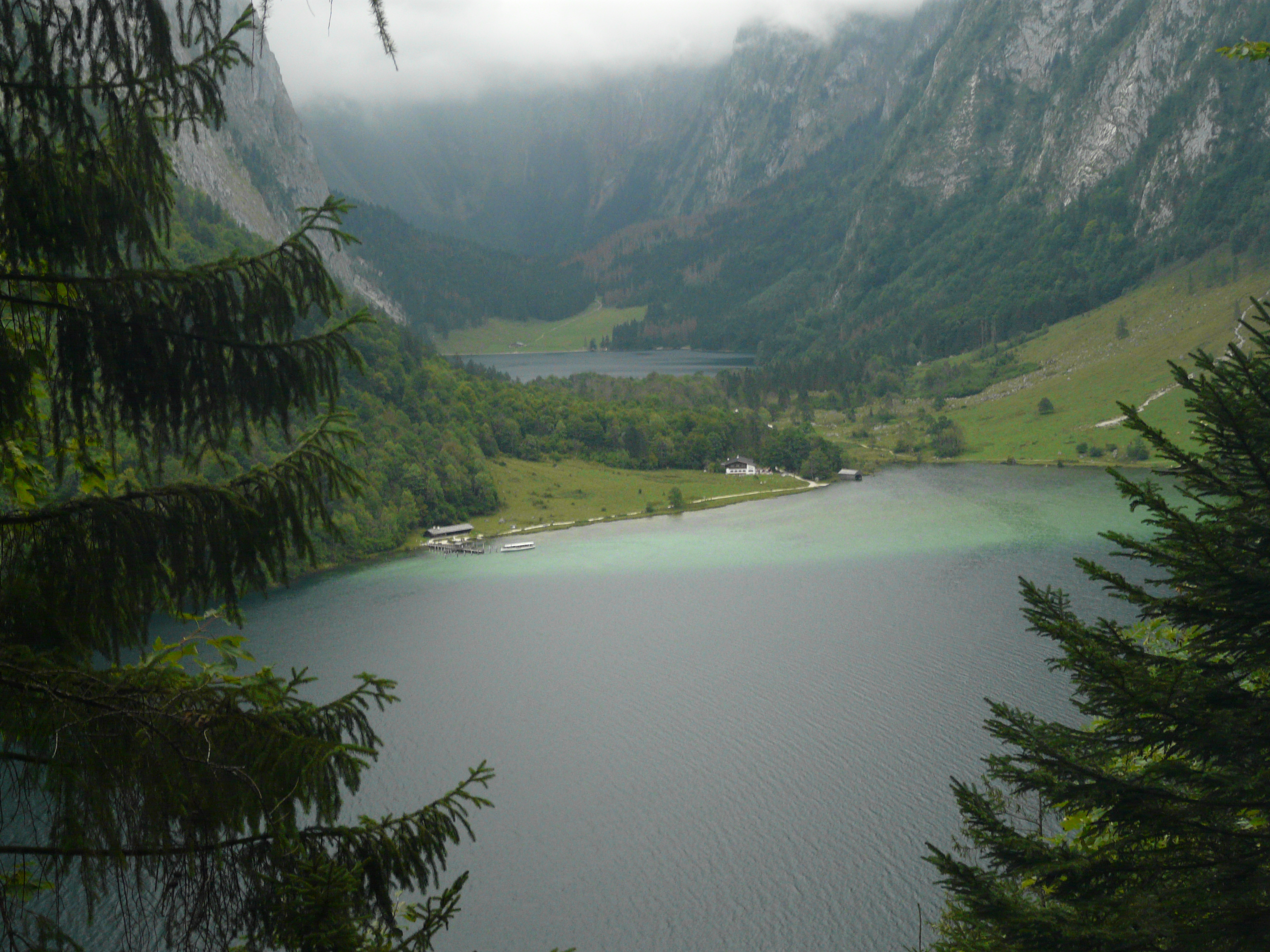 Die Saletalm am südlichen Ufer des Königssee. Sie liegt auf einem Moränenwall, der zusammen mit einem Bergsturz aus dem 11. Jahrhundert (an anderer Stelle 1172) den Königssee vom Obersee (im Hintergrund) trennt. Diese Landbrücke ist im Geotopkataster Bayern als Geotop 172R029 ausgewiesen.